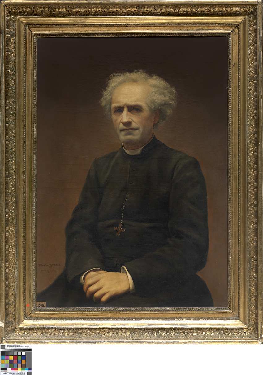 Portret van pastoor L. Van Haecke (Edouard van Speybrouck, 1897); collection: Musea Brugge - Groeningemuseum